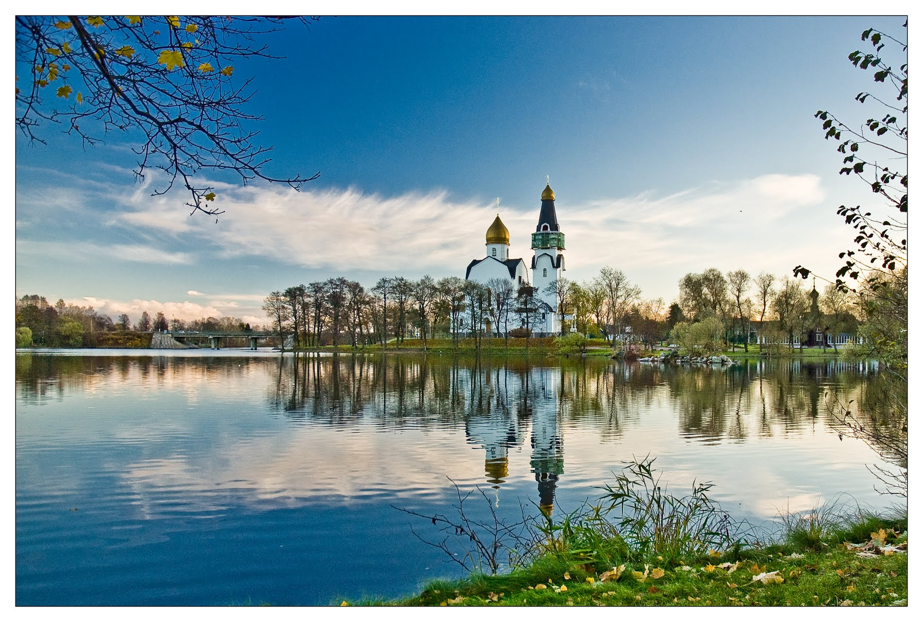 Вид на храм Петра и Павла в Сестрорецке